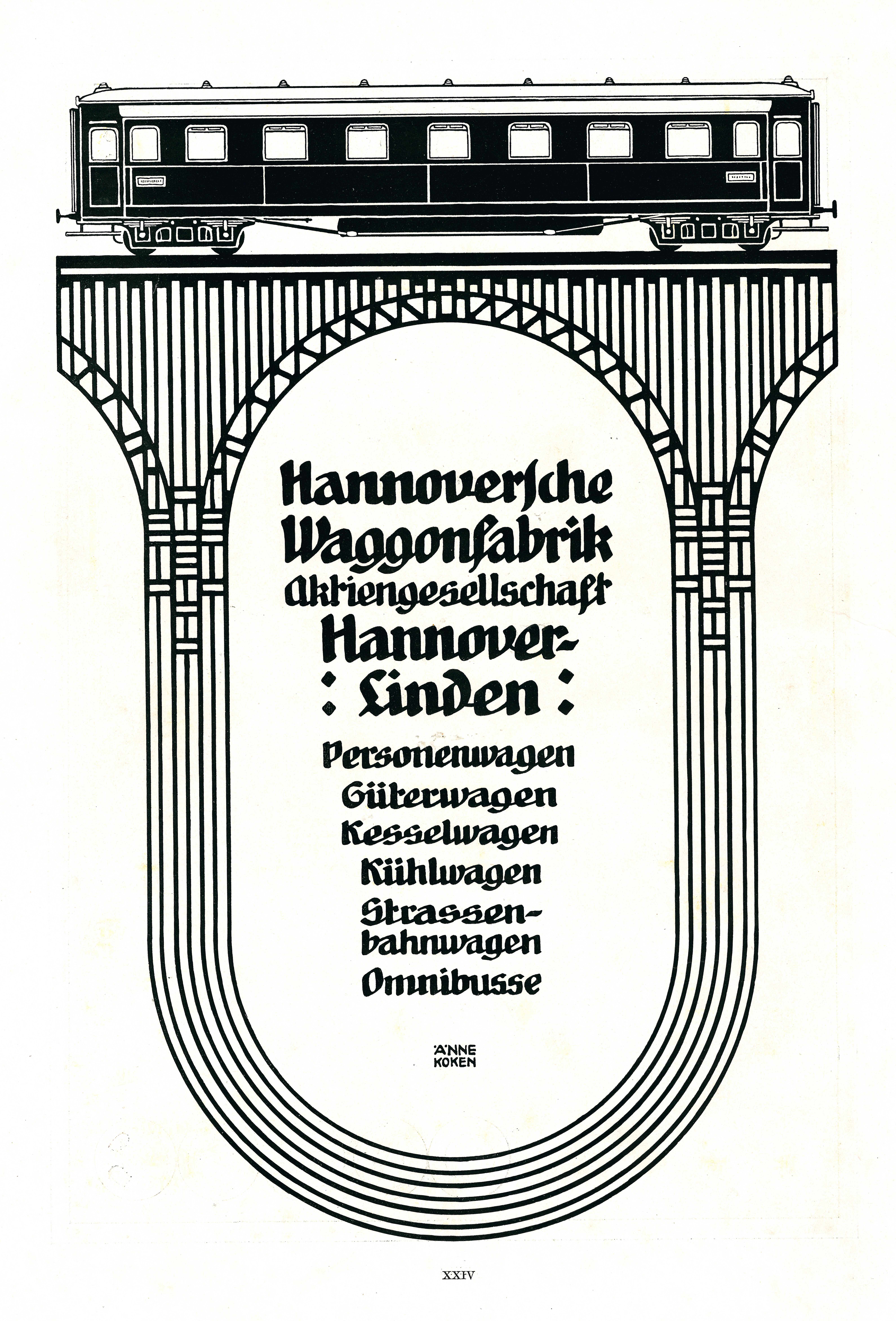 Von der Künstlerin Änne Koken gestaltete und ganzseitig reproduzierte Werbeanzeige in der Illustrirten Zeitung Nr. 3538 vom 20. April 1911: Unter einem Eisenbahnwaggon auf einer Stahlbrücke, die sich wie Gleislinien nach unten zu einem Oval verlängern, findet sich neben dem Namen der Hannoverschen Waggonfabrik Aktiengesellschaft (HAWA) und der Ortsangabe Hannover-Linden die seinerzeitige Produktpalette insbesondere der Schienenfahrzeuge aufgelistet, hier noch ohne die später von dem Unternehmen hergestellten Flugzeuge und Elektroautos: „Personenwagen, Güterwagen, Kesselwagen, Kühlwagen, Straßenbahnwagen, Omnibusse“ ...